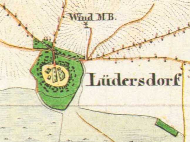 Lüdersdorf, Ortsteil der Stadt Trebbin, Lkr. Teltow-Fläming, Brandenburg, Deutschland, Urmesstischblatt von 1840